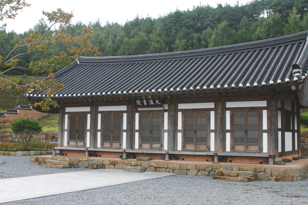 전남 보성군 보성읍 우산리에 2012년 복설한 대계서원(大溪書院)